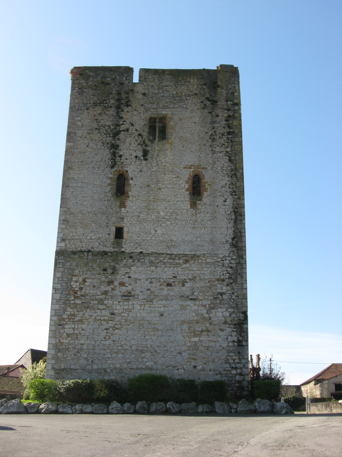 Tour carrée à Labsatide-Villefranche (Pyrénées-Atlantiques) (Pyrénées).